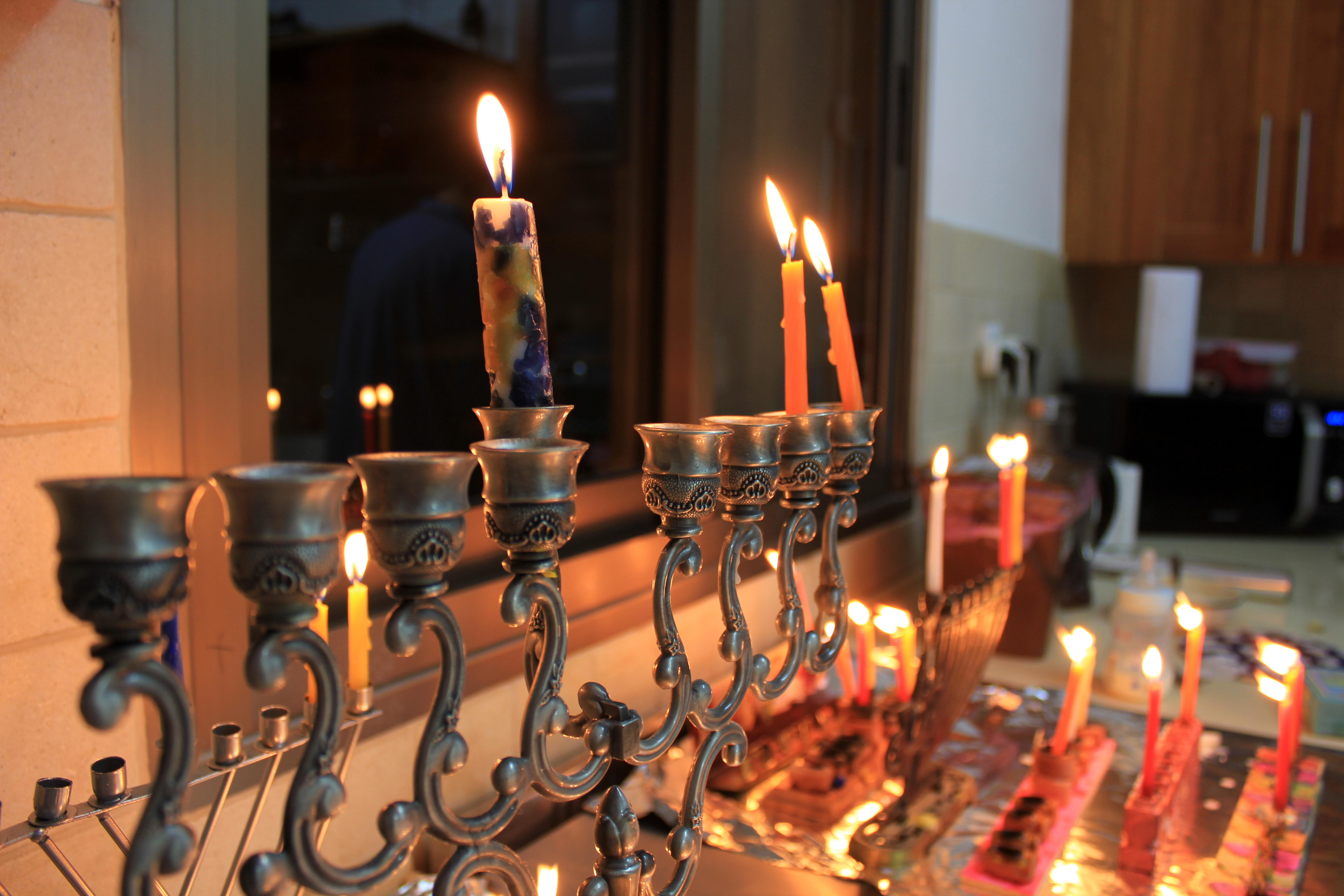 Hanukkah Hanukkah